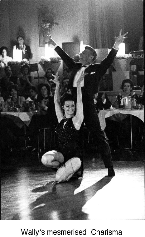 Laird & Lorraine Show